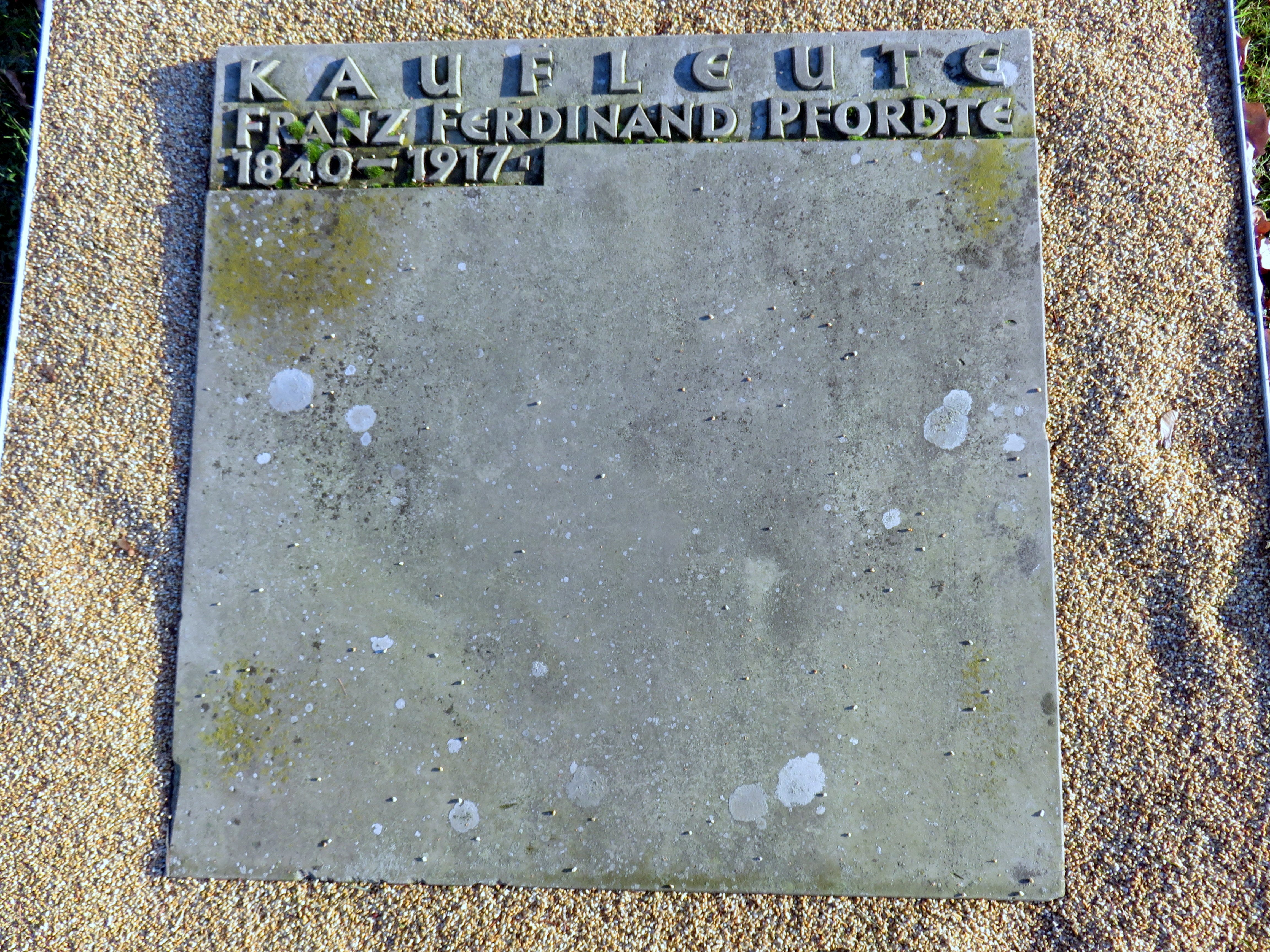 Sammelgrabplatte Kaufleute (II g) im Bereich des Althamburgischen Gedächtnisfriedhofs auf dem Hamburger Friedhof Ohlsdorf, zu Ehren von Franz Pfordte.